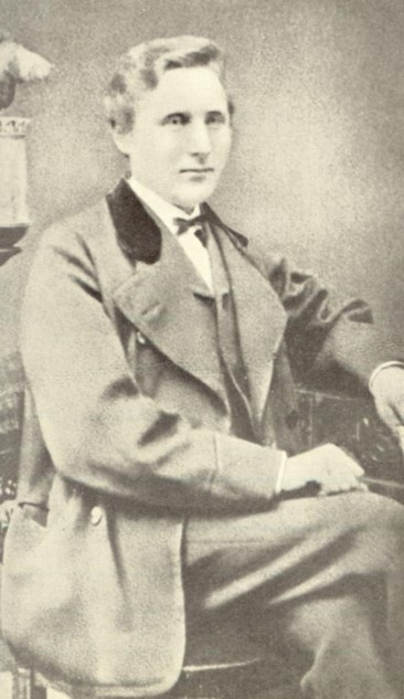 Robert Andersen fotograferet i San Francisco ca. 1874, hvor han netop var kommet til byen.